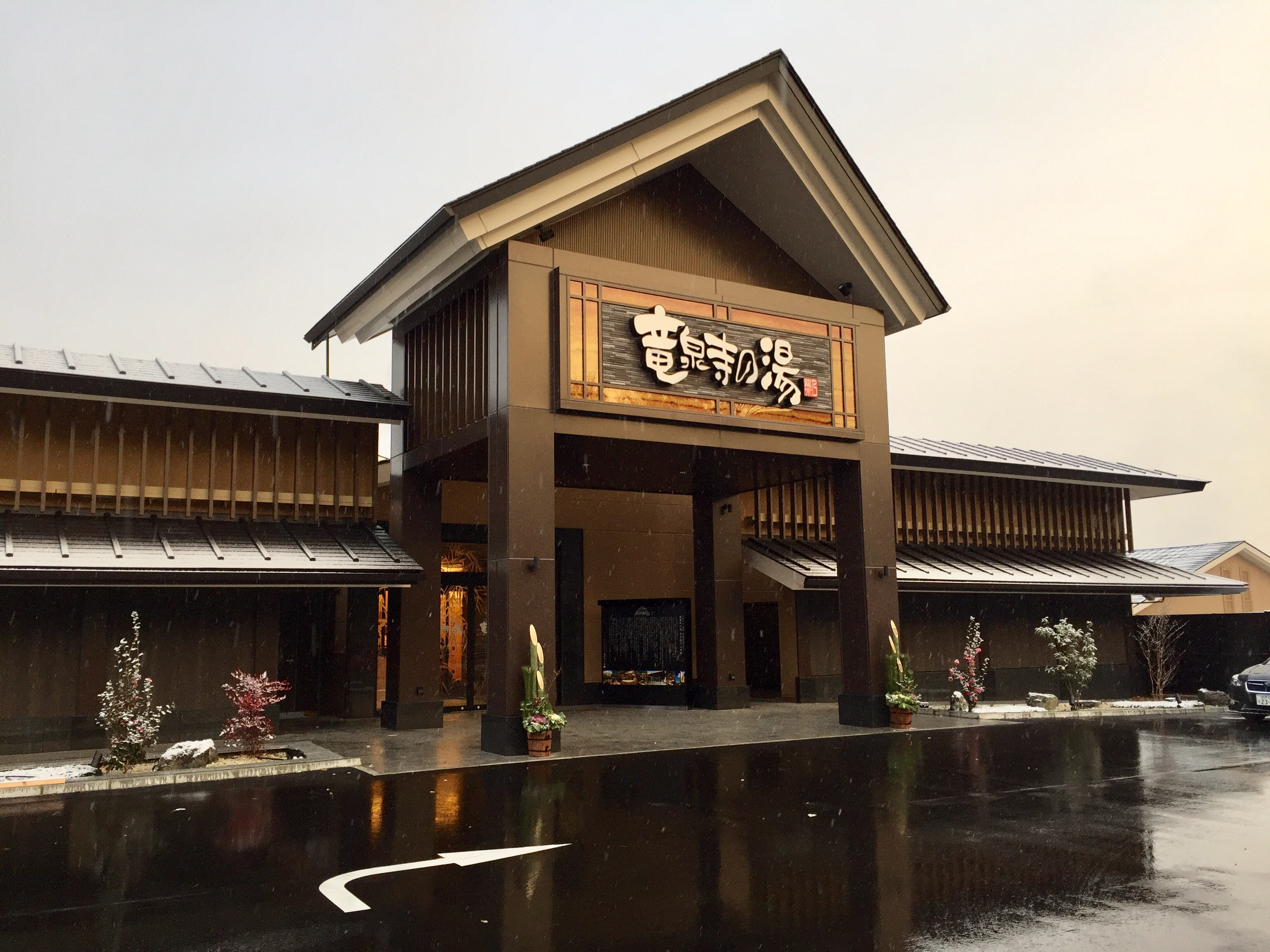 竜泉寺の湯 名古屋守山本店の2018年リニューアル後の様子（入口付近外観）。